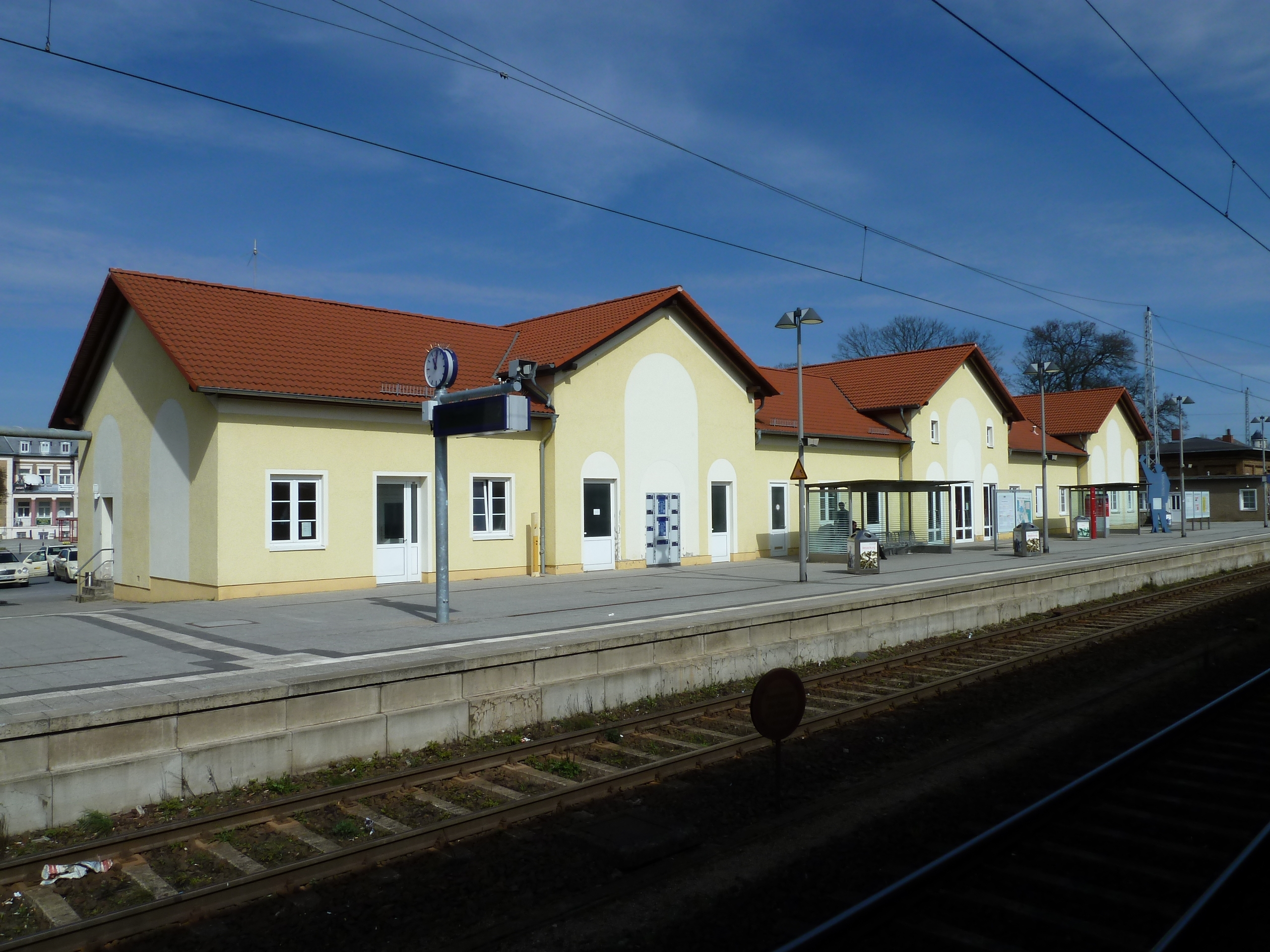 Bahnhofsgebäude in Neustrelitz